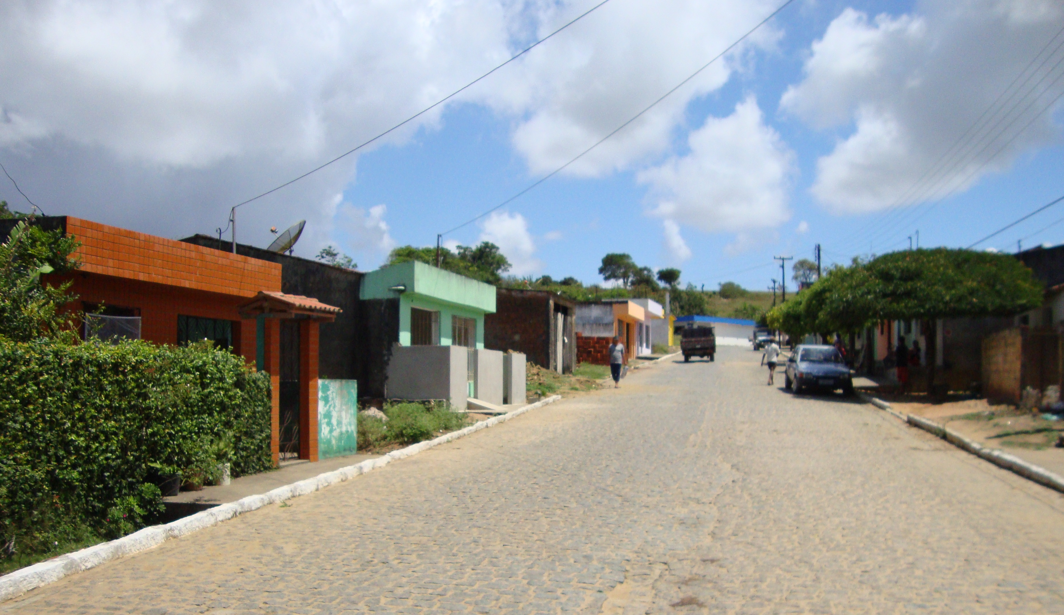 Rua do Açude Vila Matinadas, Parte do trajeto da PB-082.